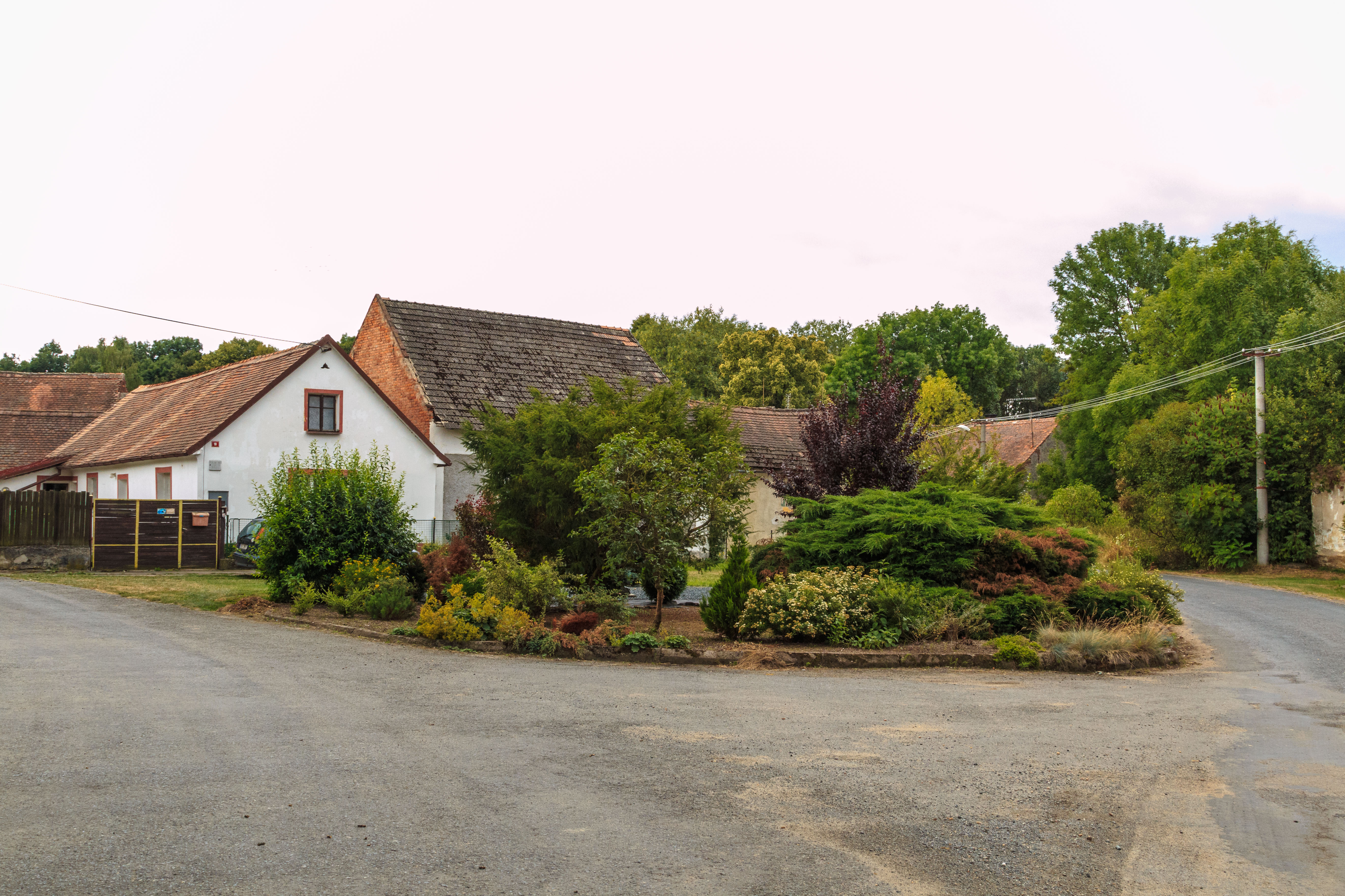 Biskupice čp. 18